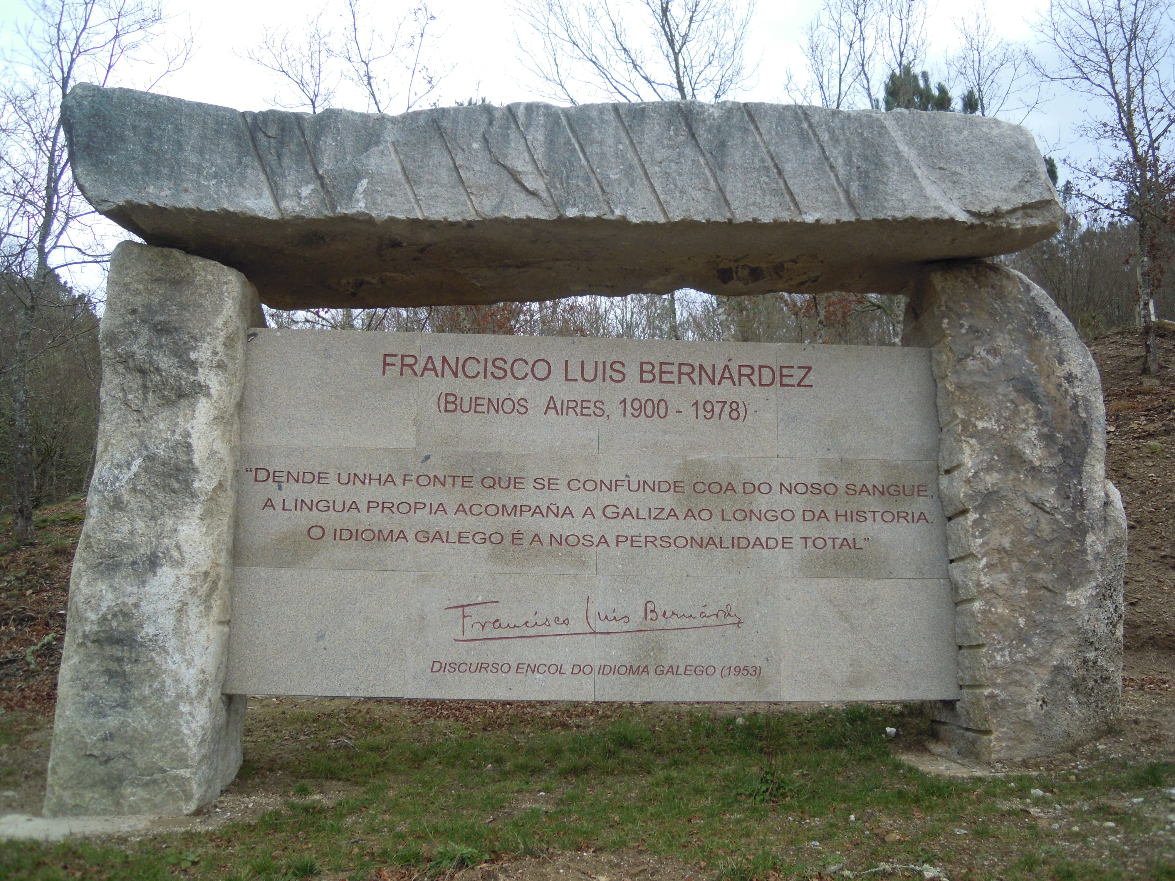 Texto de Francisco Luís Bernárdez na Insua dos Poetas